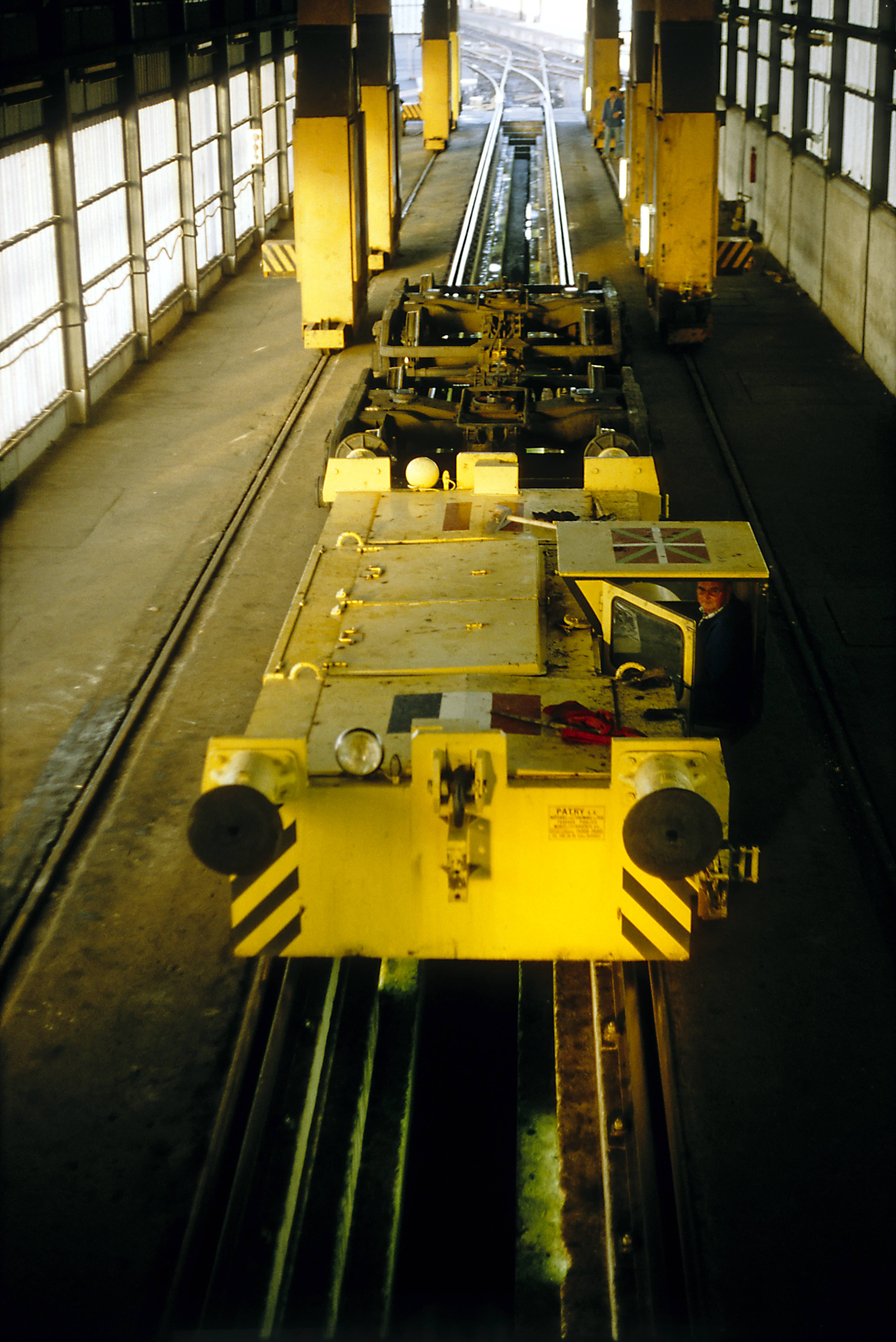 Spurwechselanlage Hendaye vom angehobenen Kurswagen Paris–Algeciras, die wahlweise auf Breit- und Regelspur einsetzbare Unterfahrlokomotive bringt die Breitspurdrehgestelle. Die Hubportale waren verfahrbar. Beim Umspuren wurden die Wagenzüge nicht getrennt. Wegen der unterschiedlichen Wagenbauarten musste die erforderliche Reihung der Drehgestelle vorher bekannt sein.